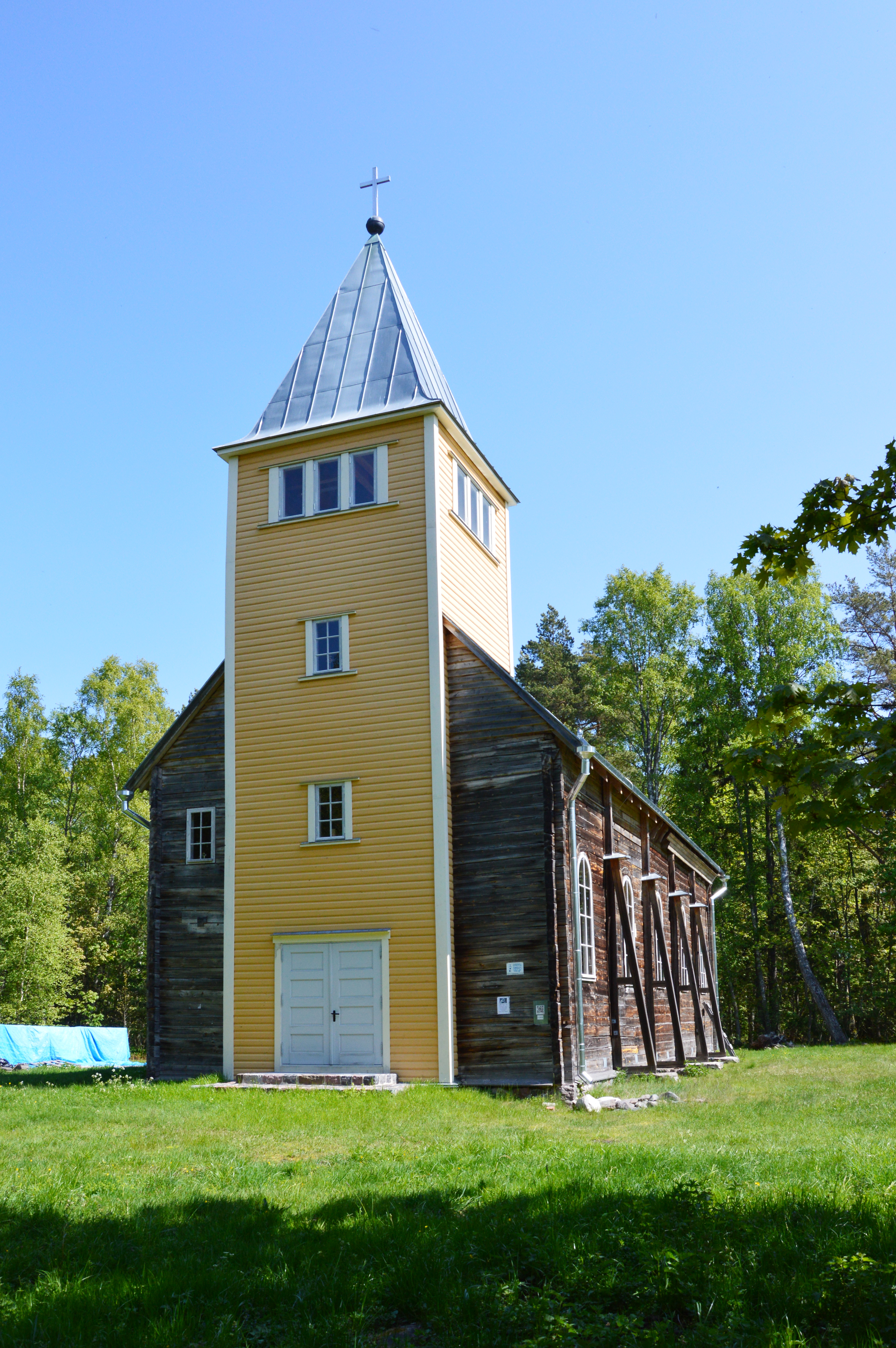 Naissaare kirik